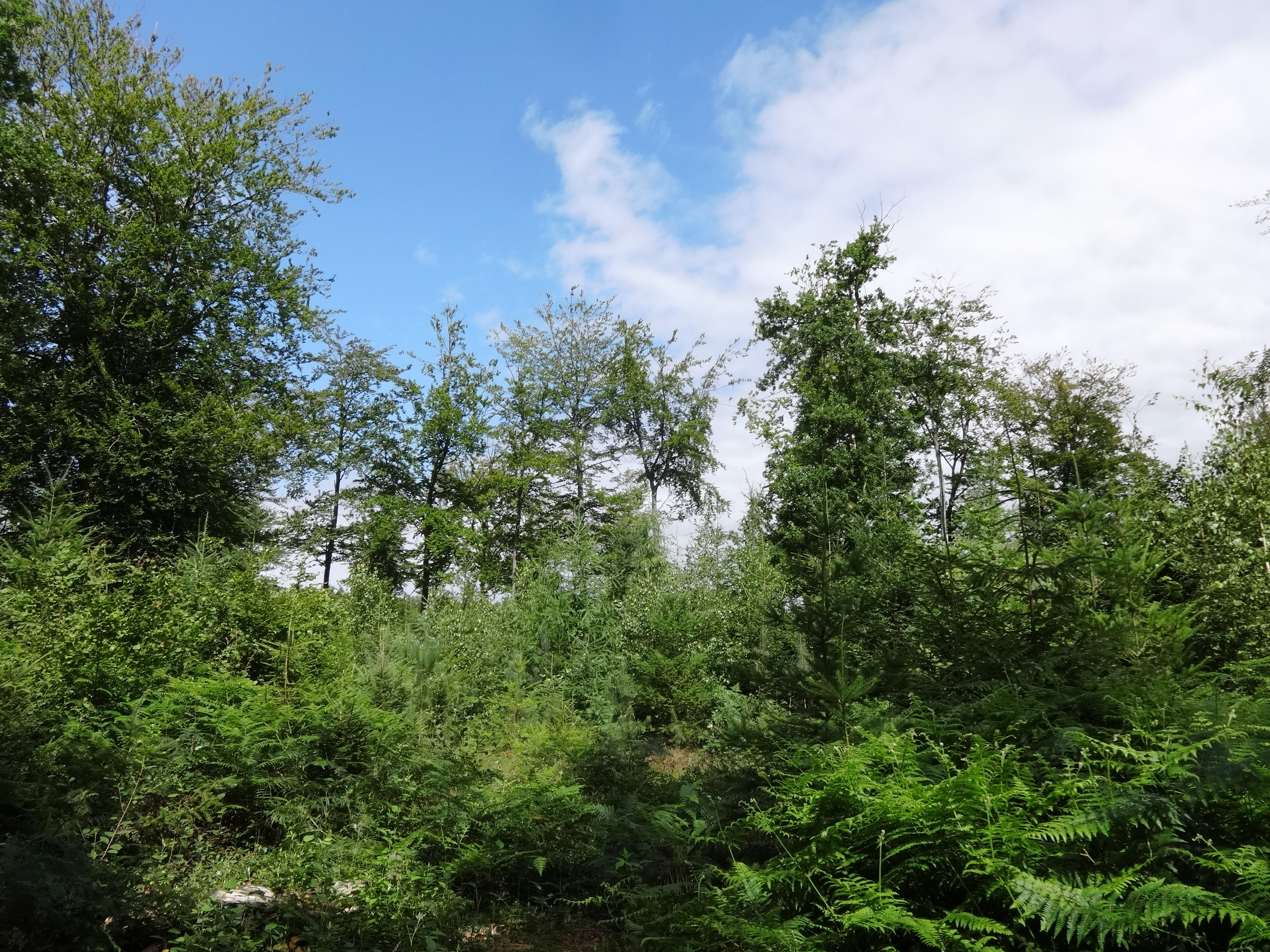 Das NSG Karlsburger und Oldenburger Holz ist ein Naturschutzgebiet in Mecklenburg-Vorpommern mit einem strukturierten Waldgebiet, feuchten Senken und Grünlandflächen. Es ist Lebensraum des Schreiadlers. Durch das NSG führen mehrere Wanderwege sowie eine Allee, die mit den Bäumen des Jahres bepflanzt ist.